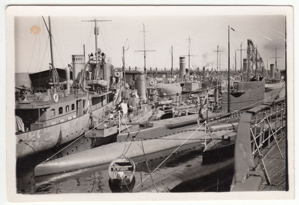 Estońskie okręty wojenne „Pikker”,„Sulew”, „Ristna”, „Suurop”, „Kalev” i inne w starym porcie w Tallinie.